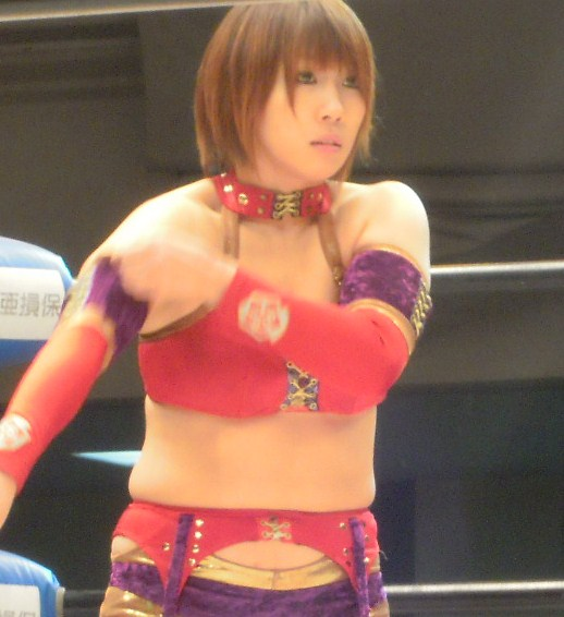 華名 2010年12月31日 大晦日年越しプロレス2010カウントダウンスペシャル 後楽園ホール大会 投稿者撮影